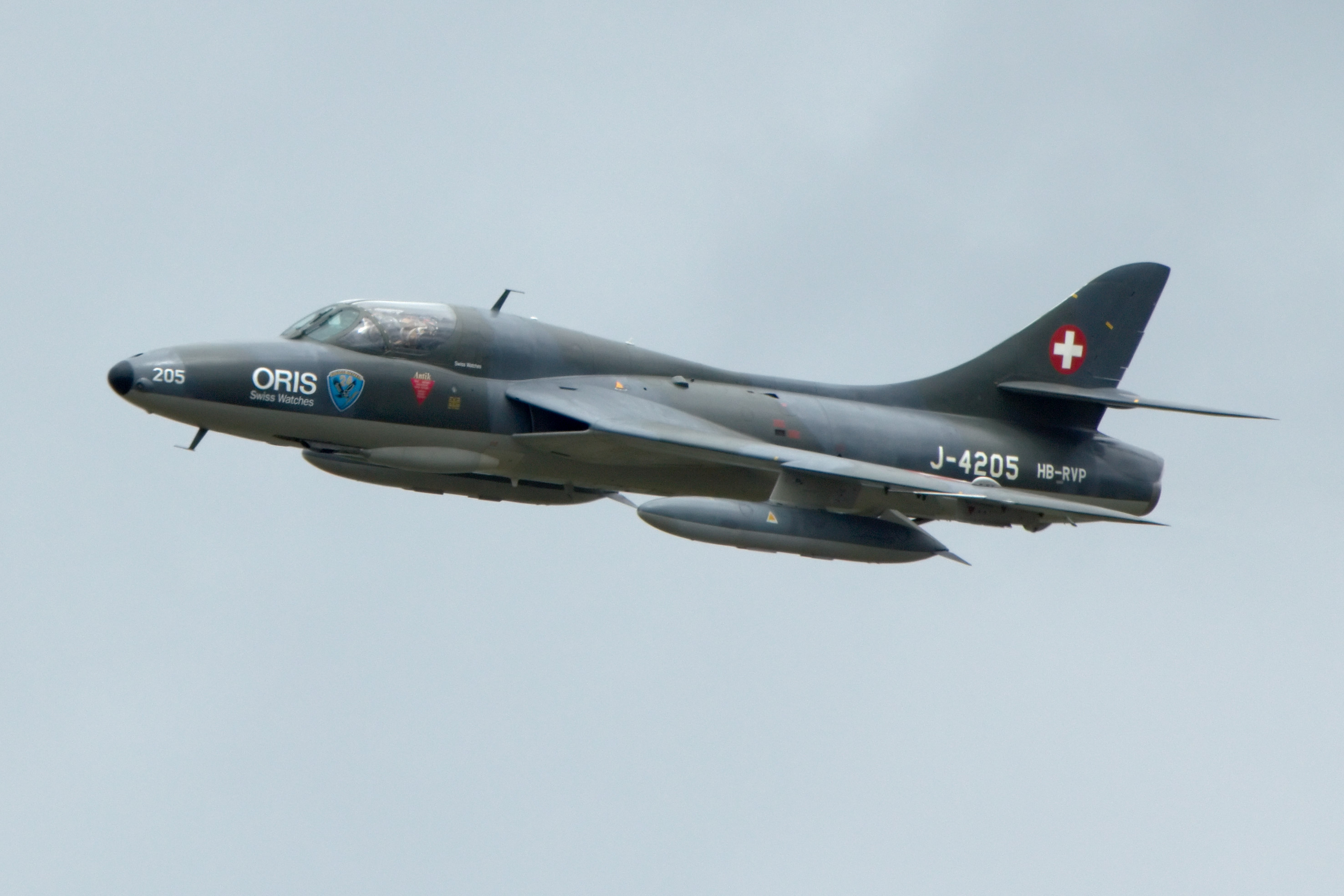 Hawker Hunter at ILA 2010